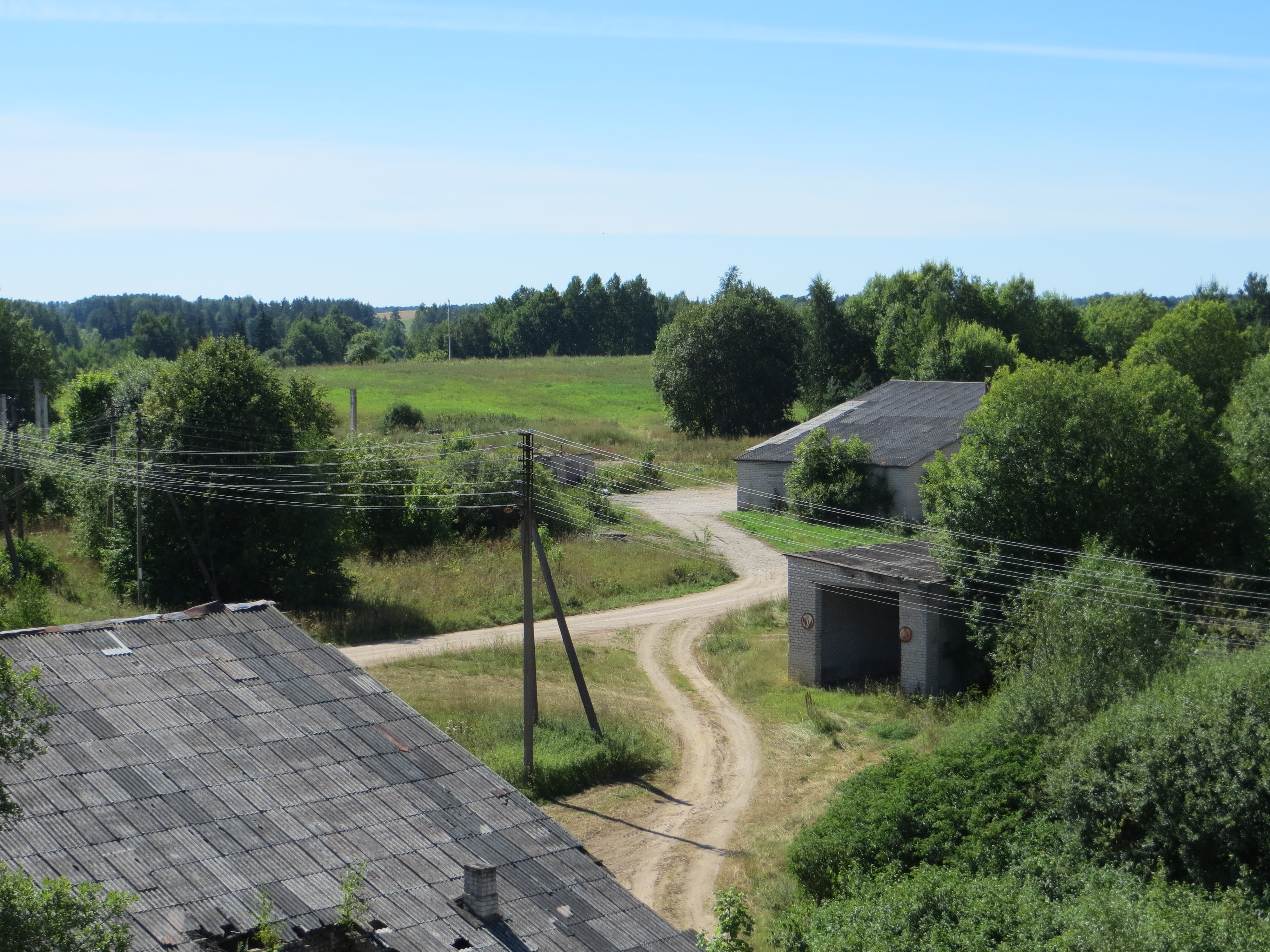 Jūžintai, Lithuania